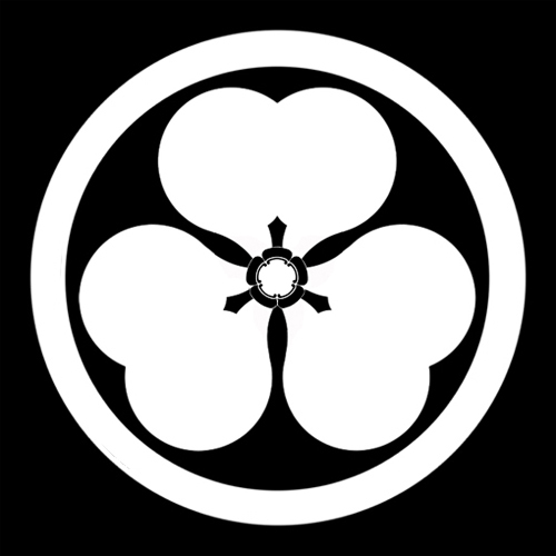 「丸に中が瓜実の片喰」紋（染抜）